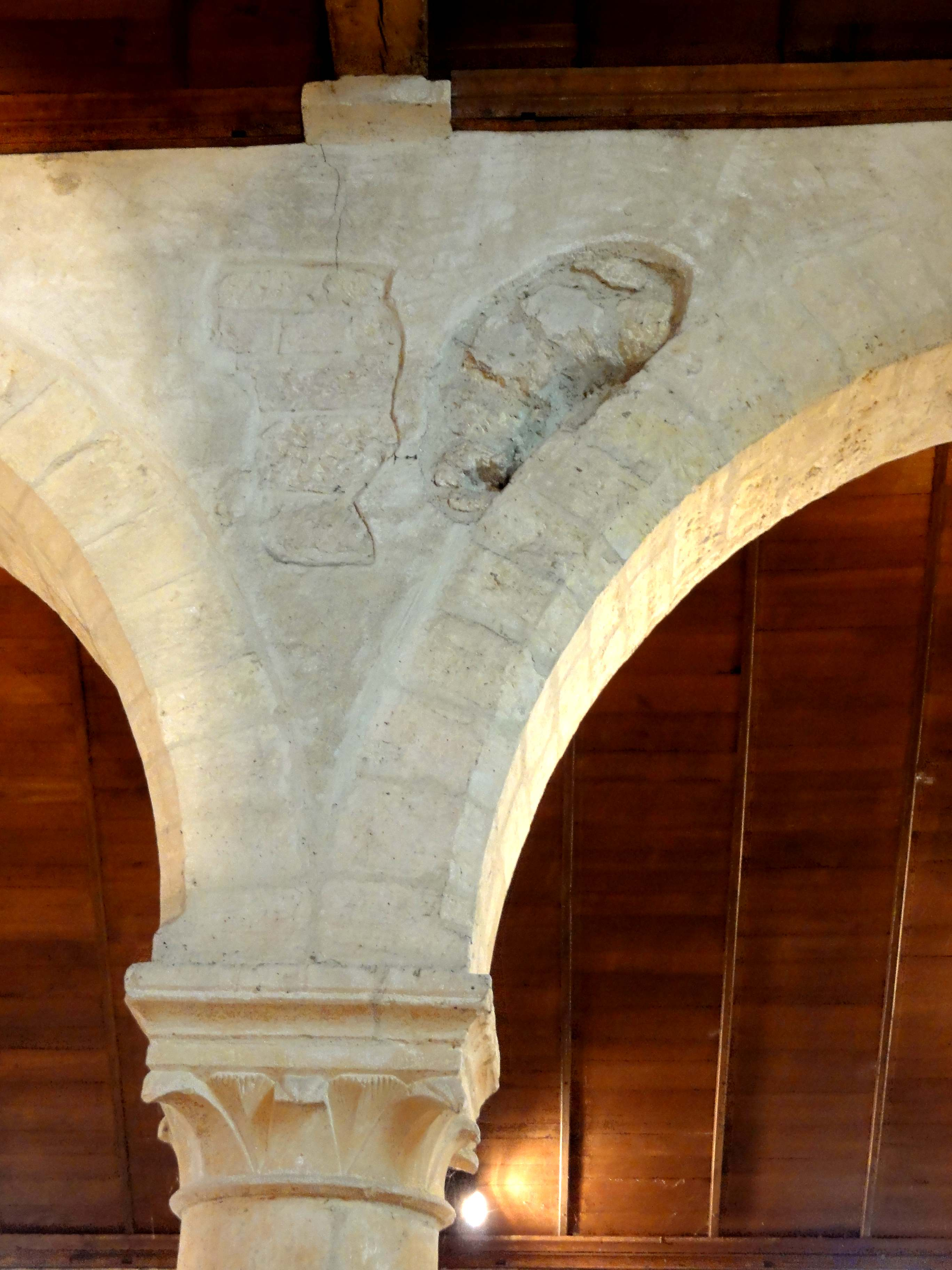 Nef, ancienne fenêtre romane près du 1er pilier du sud.